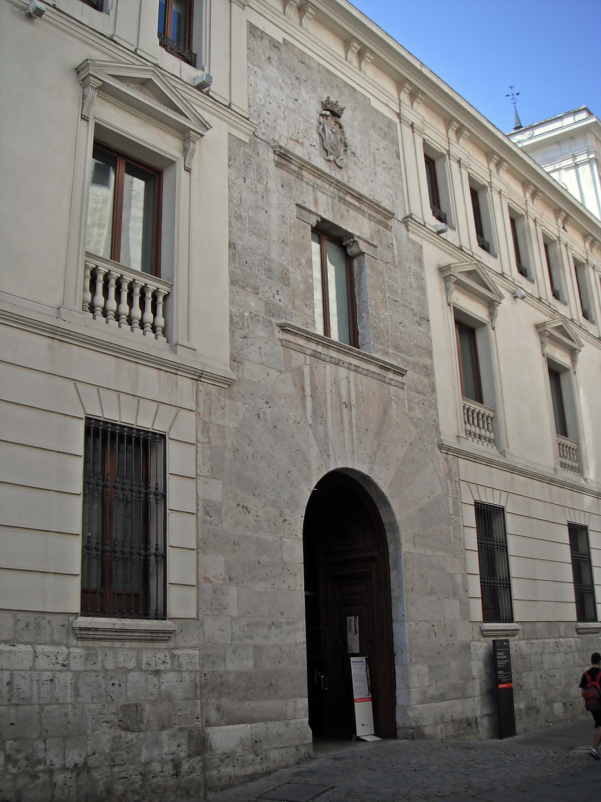 Palacio de los Villena perteneciente al complejo del Museo Nacional Colegio de San Gregorio (Valladolid)